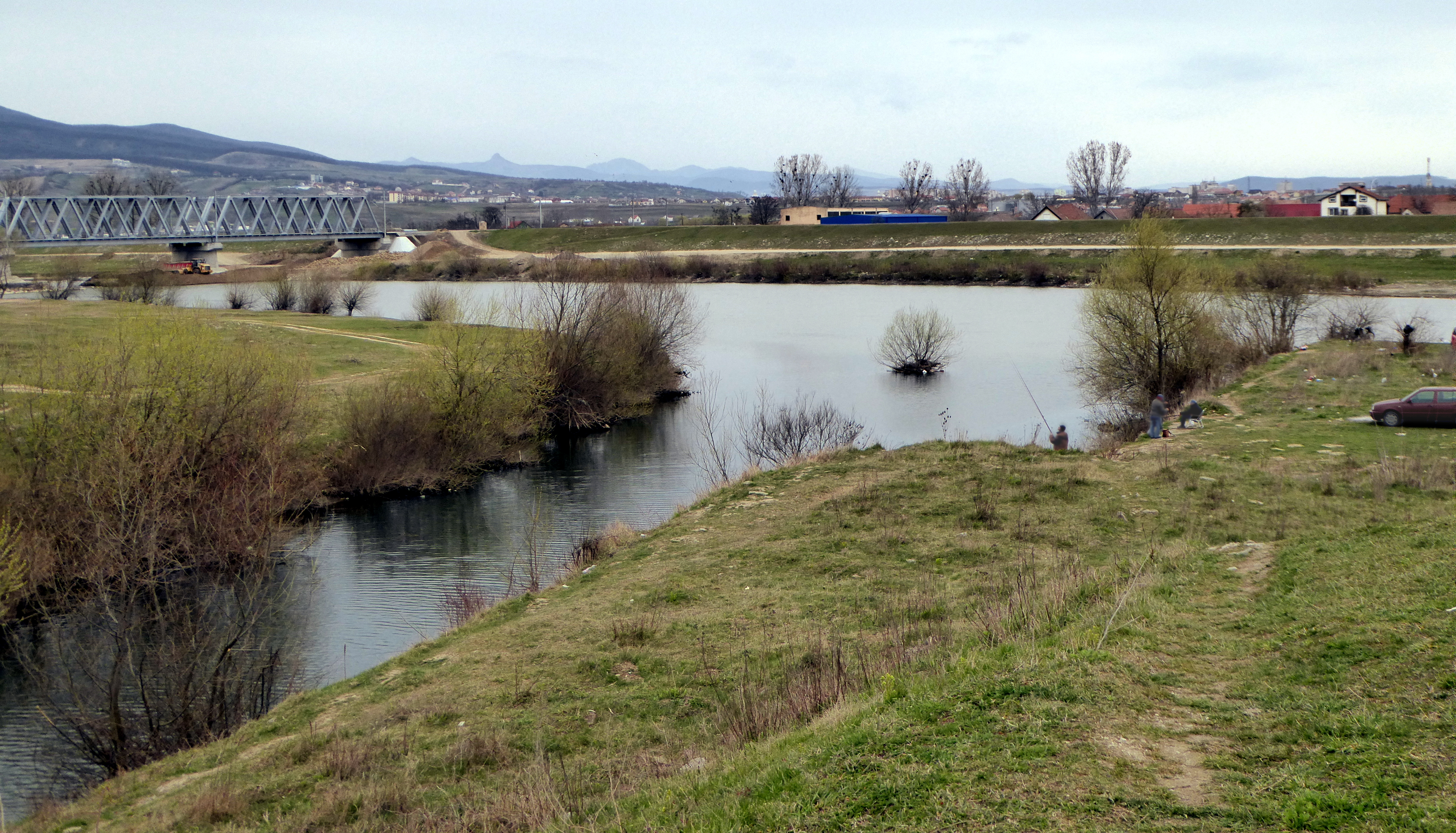 Mündung des Mühlbachs in den Mieresch bei Karlsburg (RO).